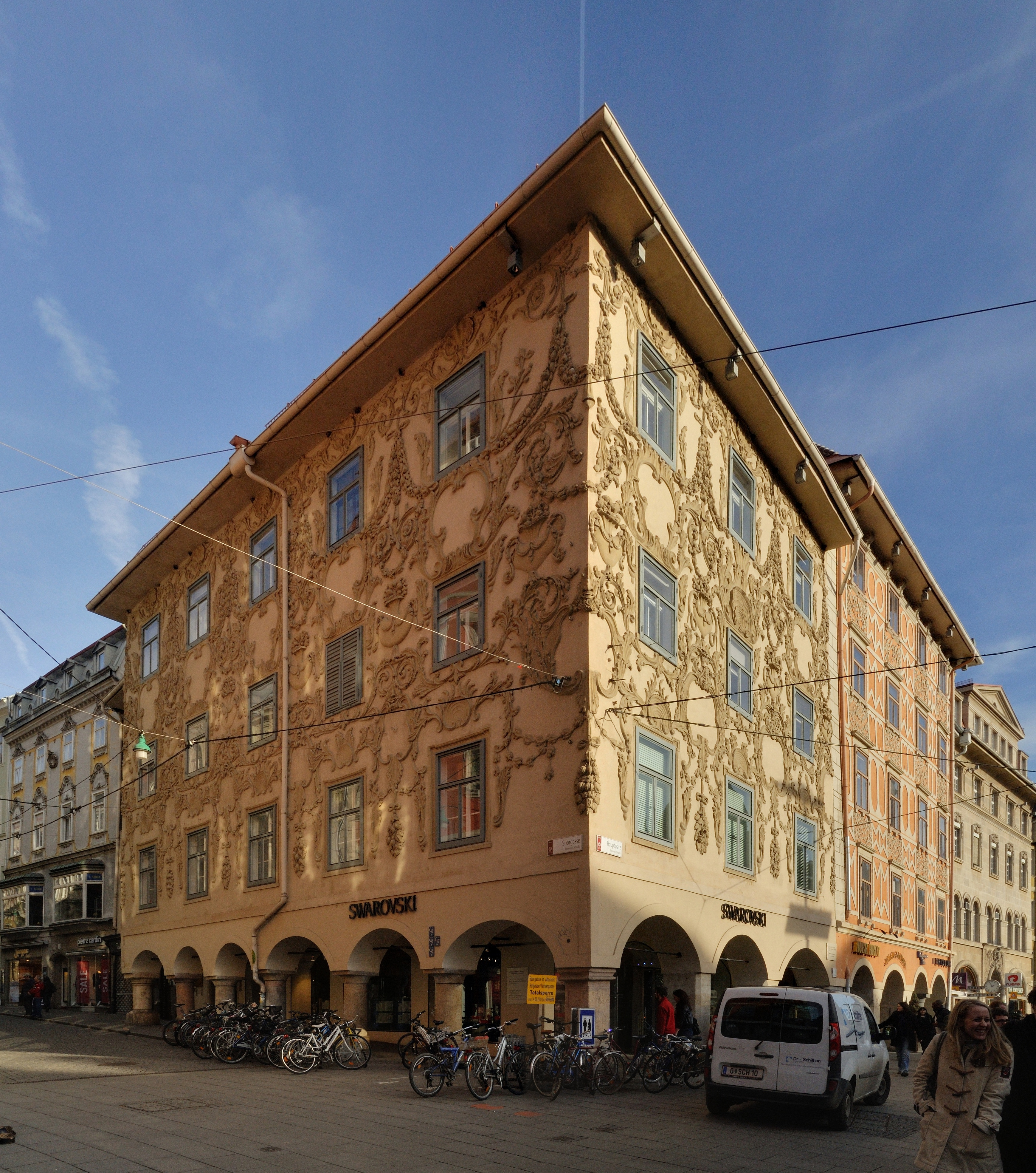 Graz: Luegg-Häuser an der Sporgasse/ Hauptmarkt